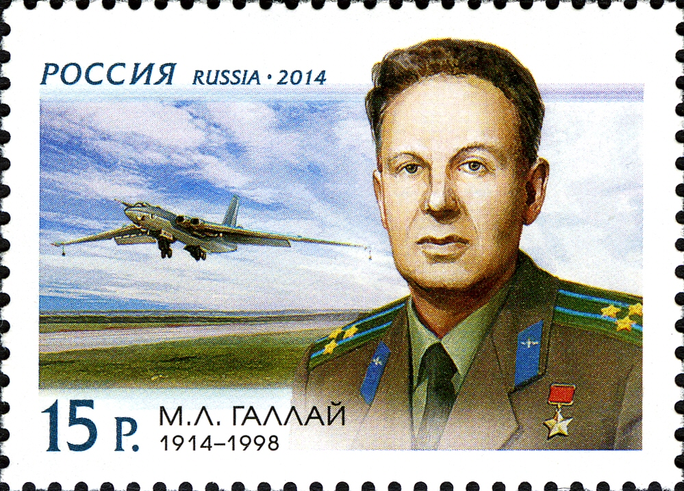 100 лет со дня рождения М.Л. Галлая (1914–1998), лётчика-испытателя